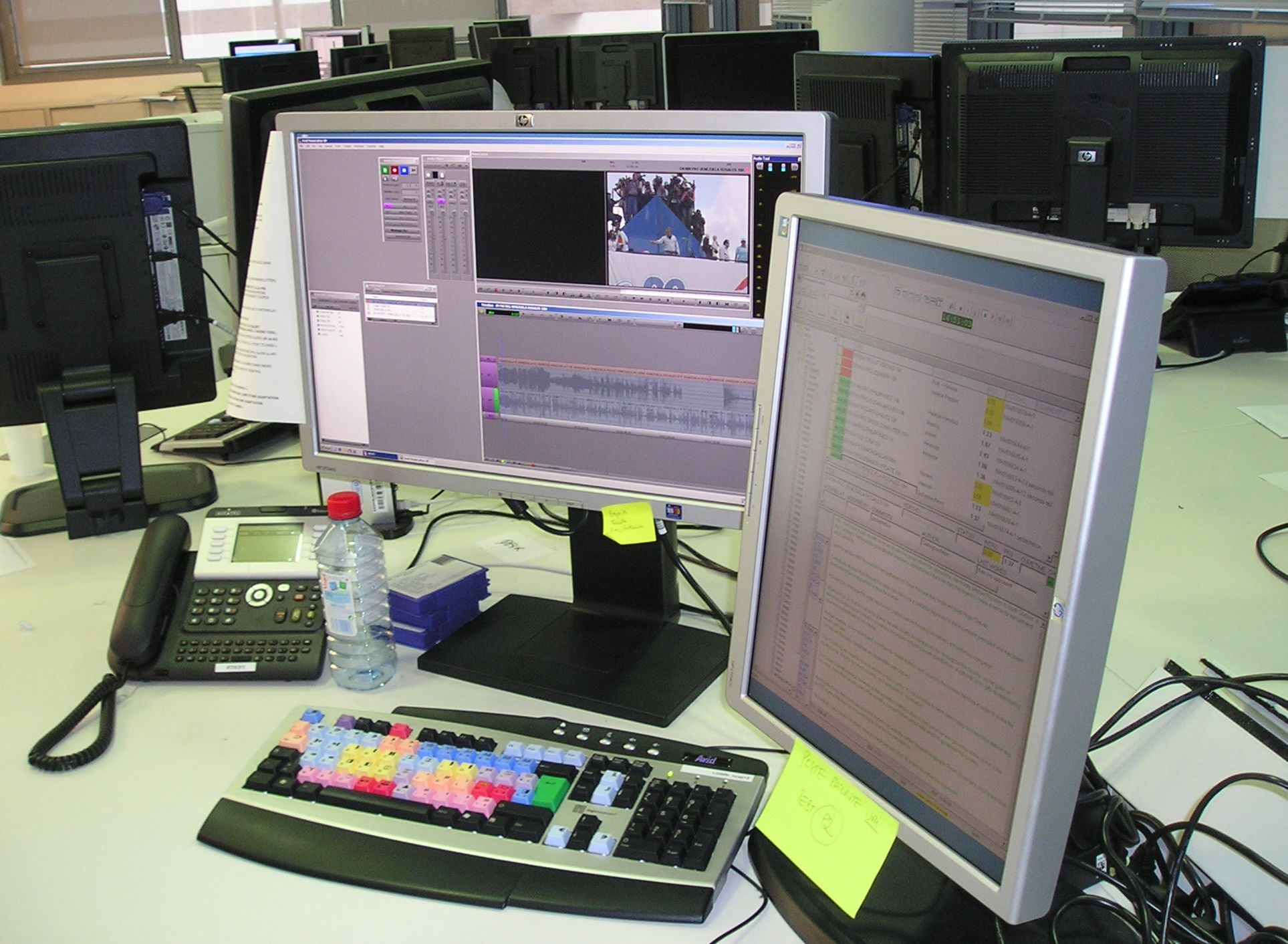 Poste de montage. France 24.